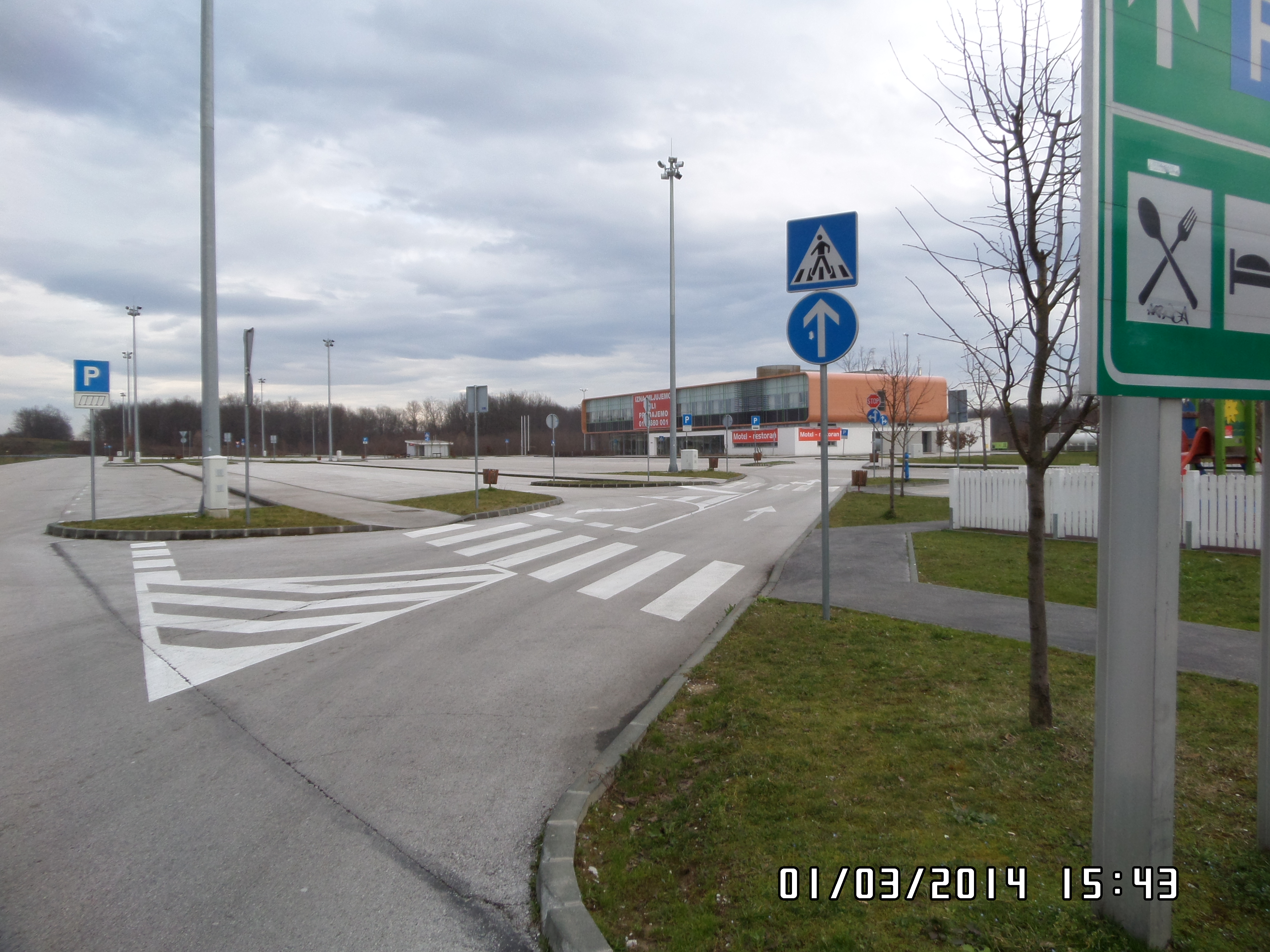 10450, Donji Desinec, Kroatien